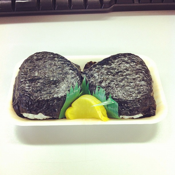 ボーナス振込日のひるごはん。